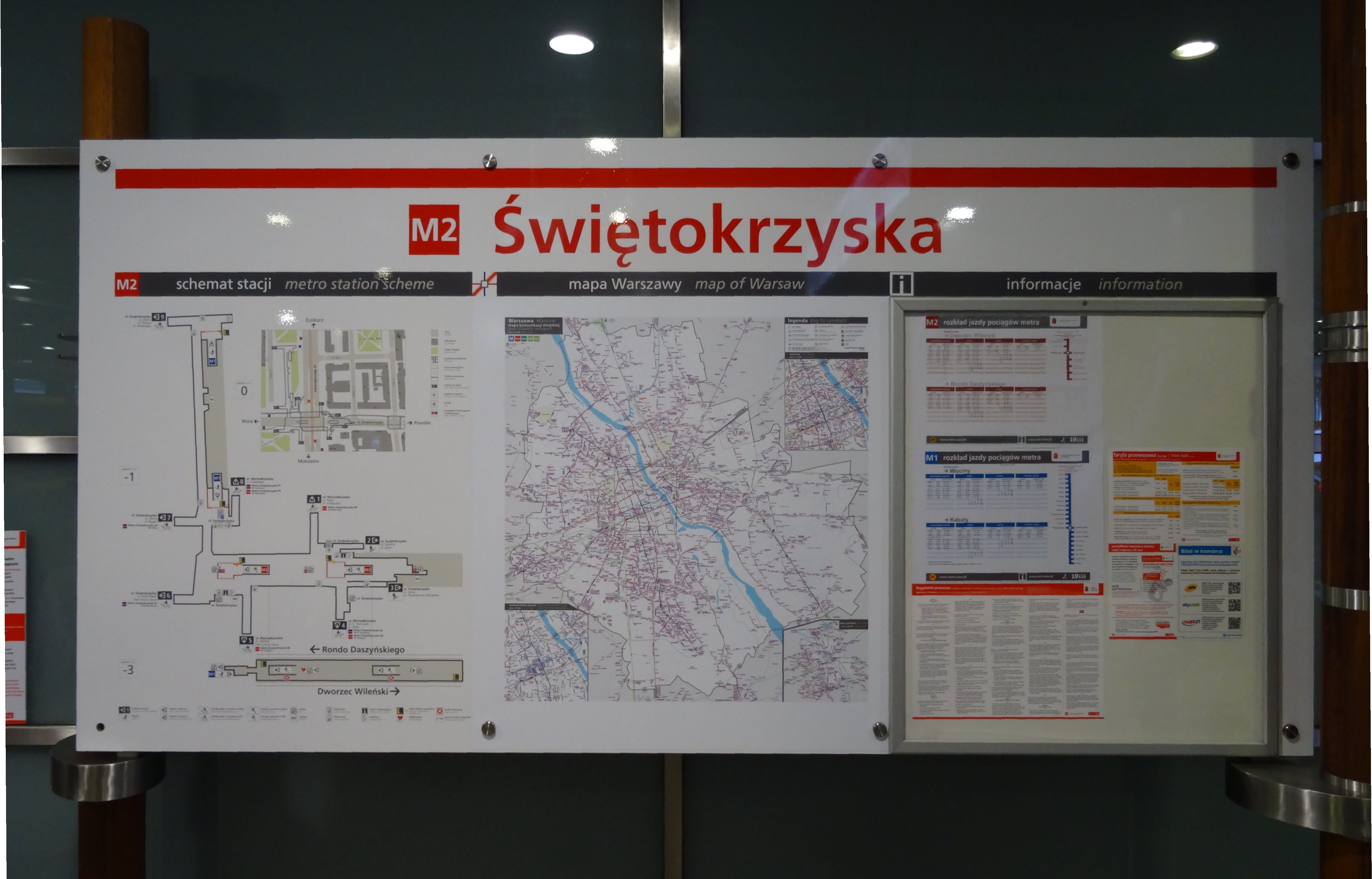 Warszawa - metro linia M2 - stacja Świętokrzyska